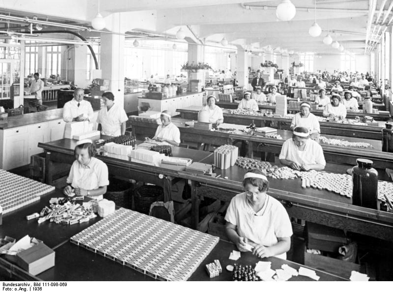 Pharmazeutika-Verpackungsraum